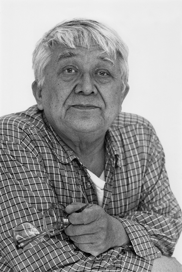 Lütfi Özkök 1987.